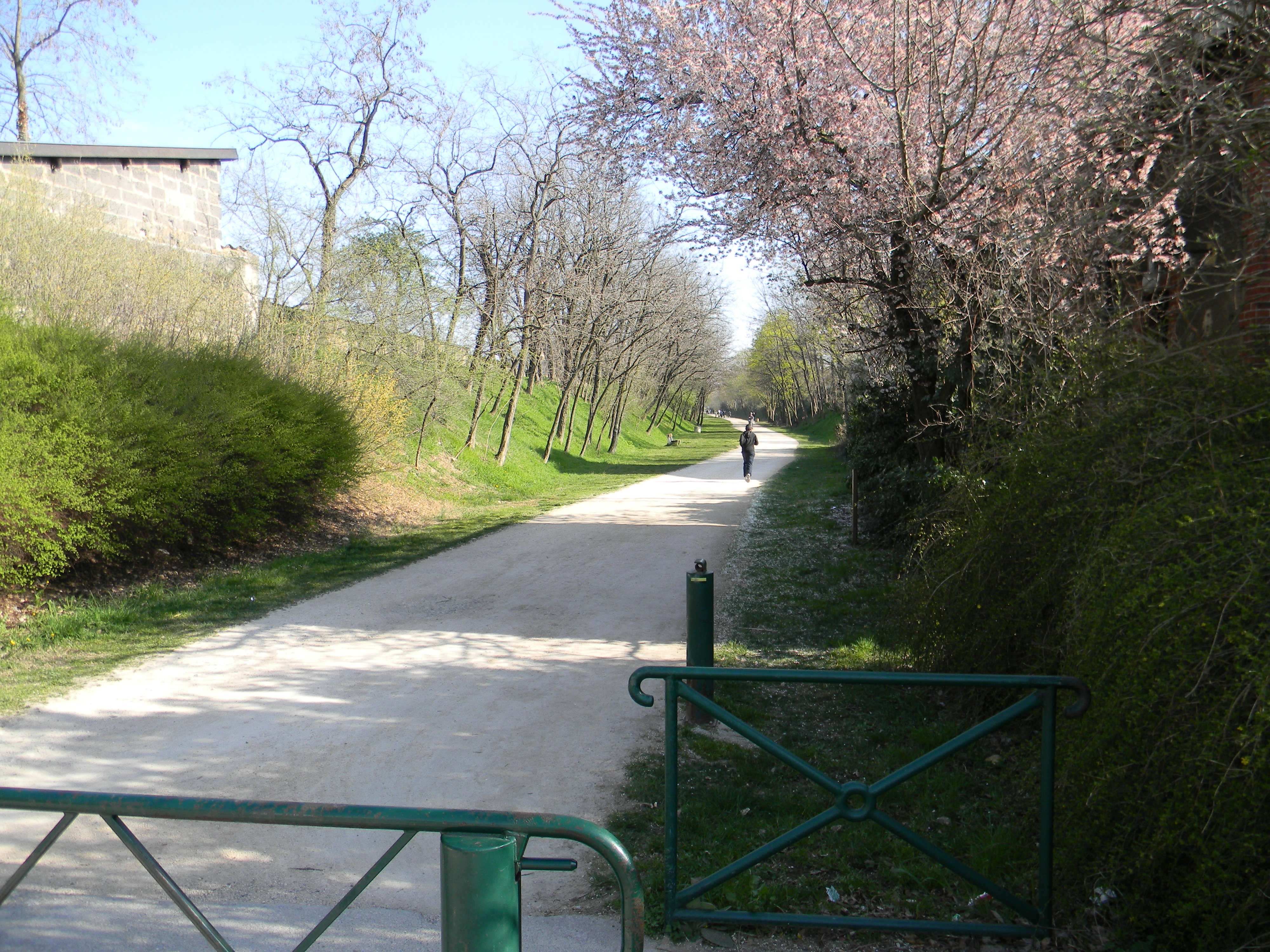 Voie de la Dombes en 2011 à Caluire-et-Cuire